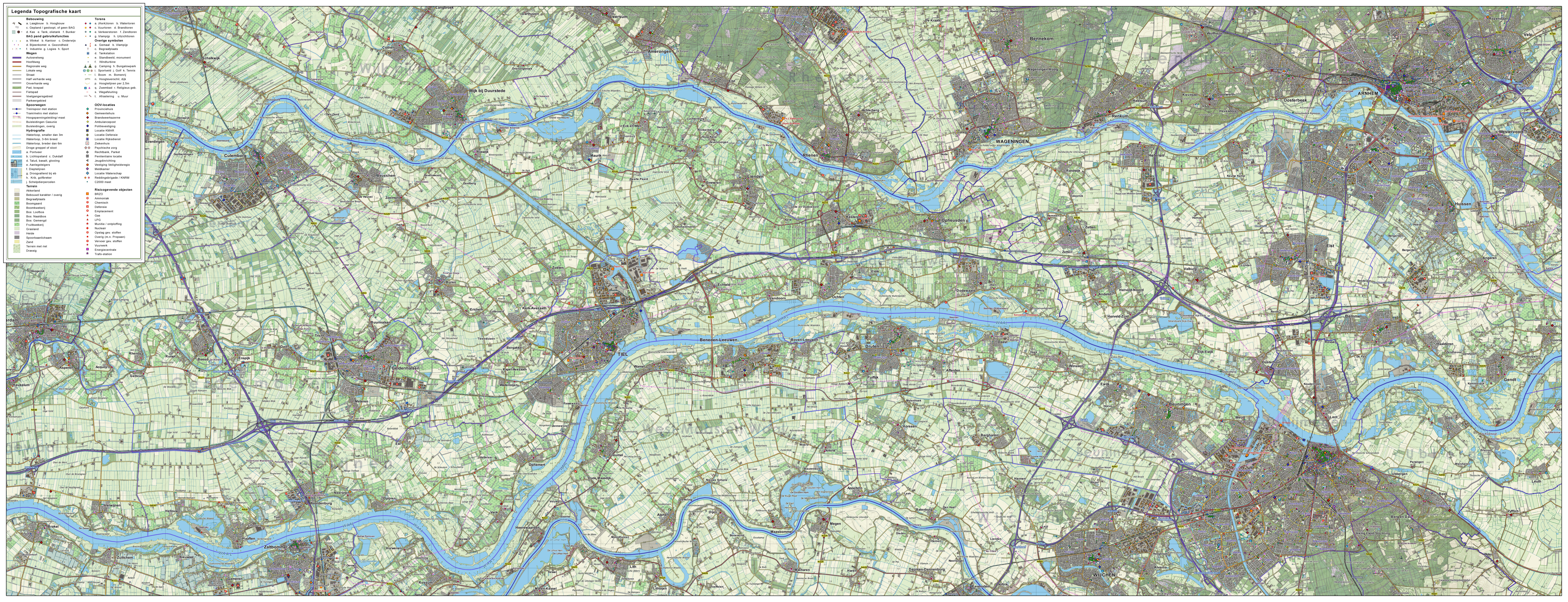 Topografische kaart van het gebied de Betuwe. Op basis van de GML open geodata van de BRT/Top10NL (basisregistratie Topografie, Kadaster 2011), vrijgegeven door Kadaster onder de Creative Commons BY licentie. Samenstelling en kleurenschema: Jan-Willem van Aalst, met QuantumGIS en Photoshop.